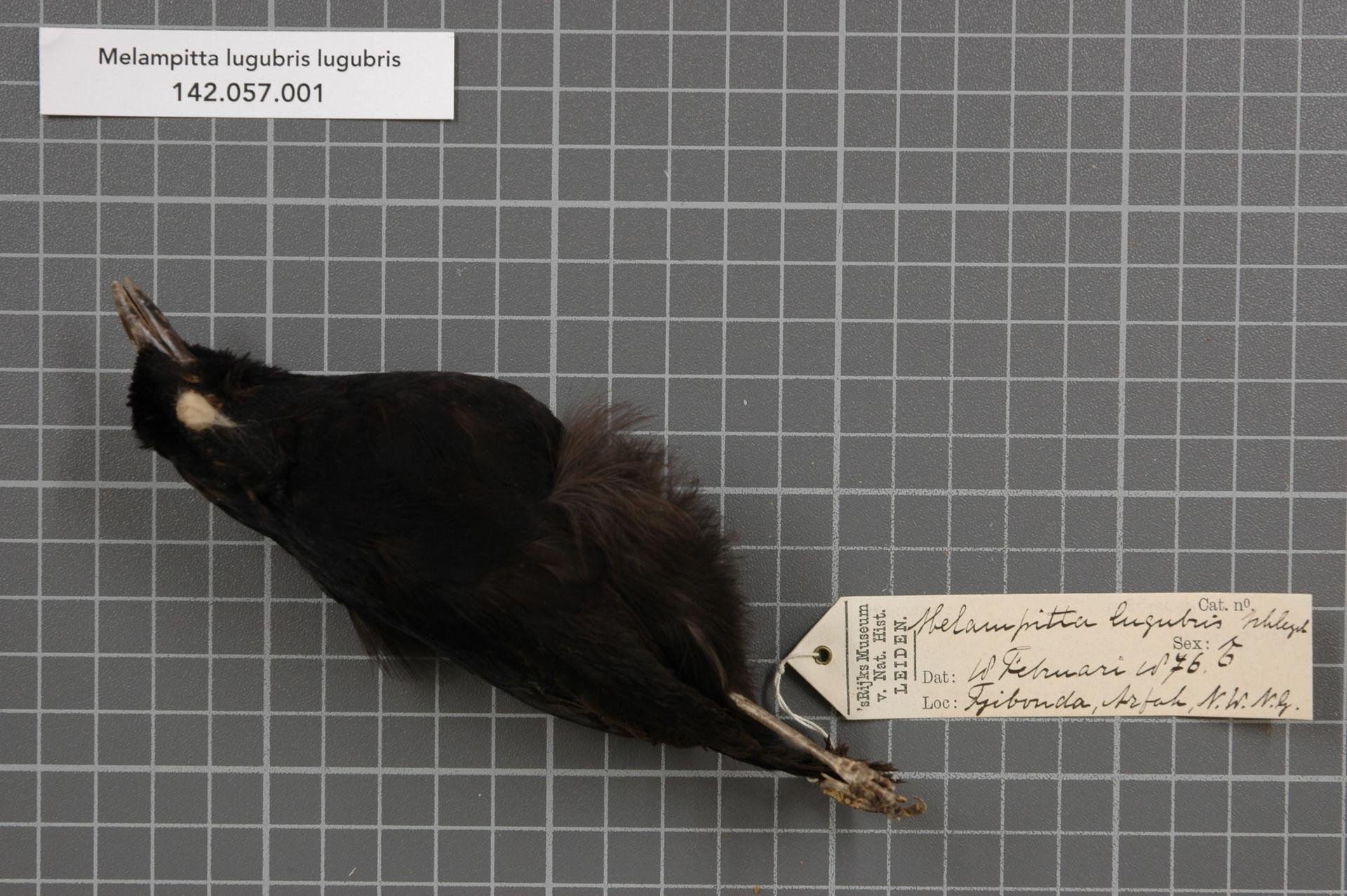 Melampitta lugubris lugubris Schlegel, 1873